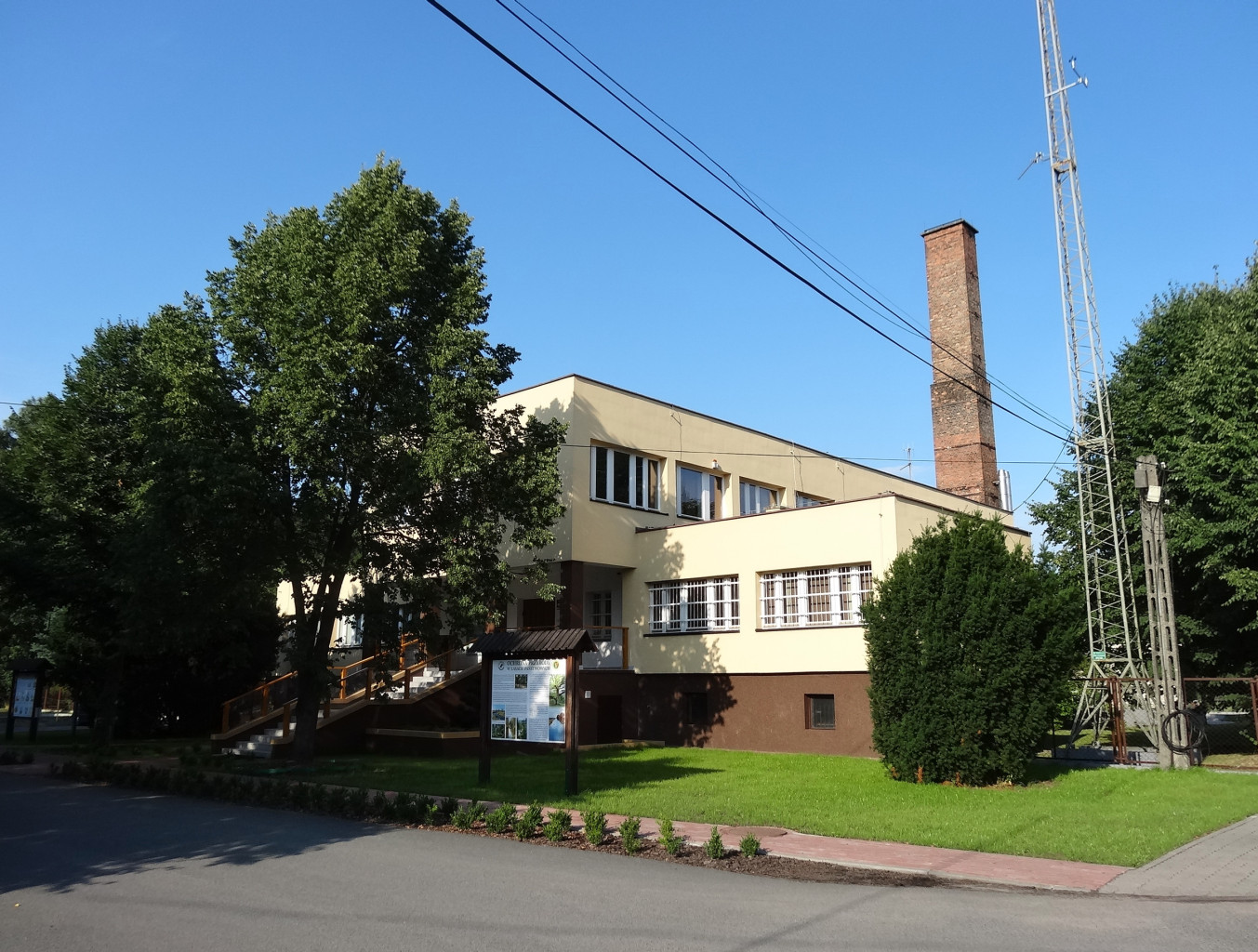 Siedziba nadleśnictwa Bydgoszcz w Lipnikach, gmina Białe Błota